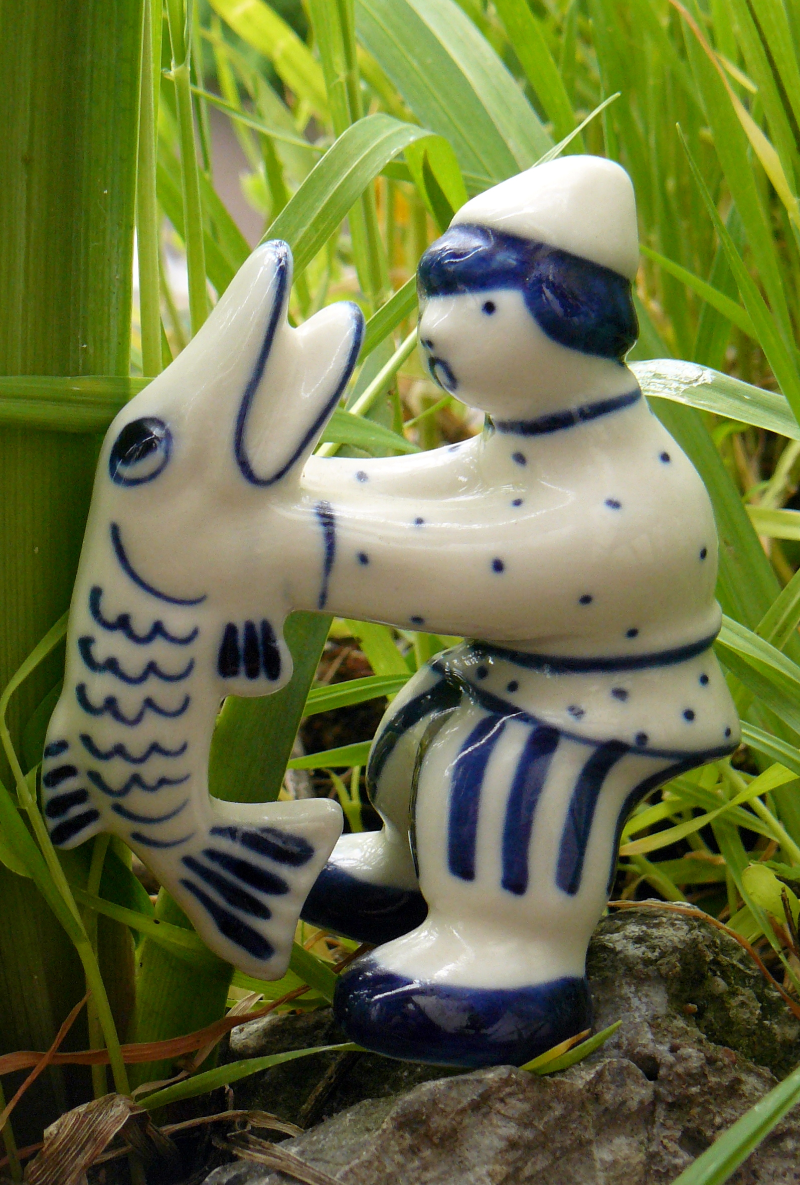 Emelia et le Brochet, personnages du conte traditionnel russe "Par l'ordre du brochet" (Céramique de Gjel', époque soviétique)